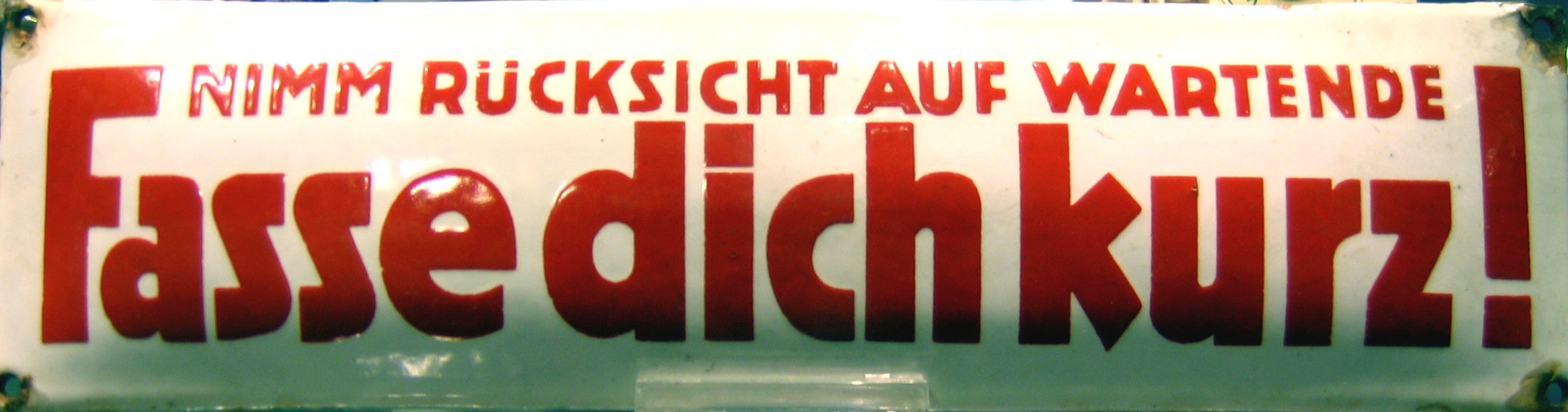 Fass dich kurz, Aufschrift auf deutschen Telefonzellen, Deutsches Technikmuseum, selbst fotografiert